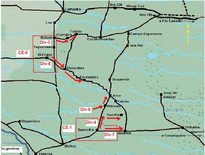 Guerra del Chaco. Ofensiva ejército boliviano enero a marzo de 1933.